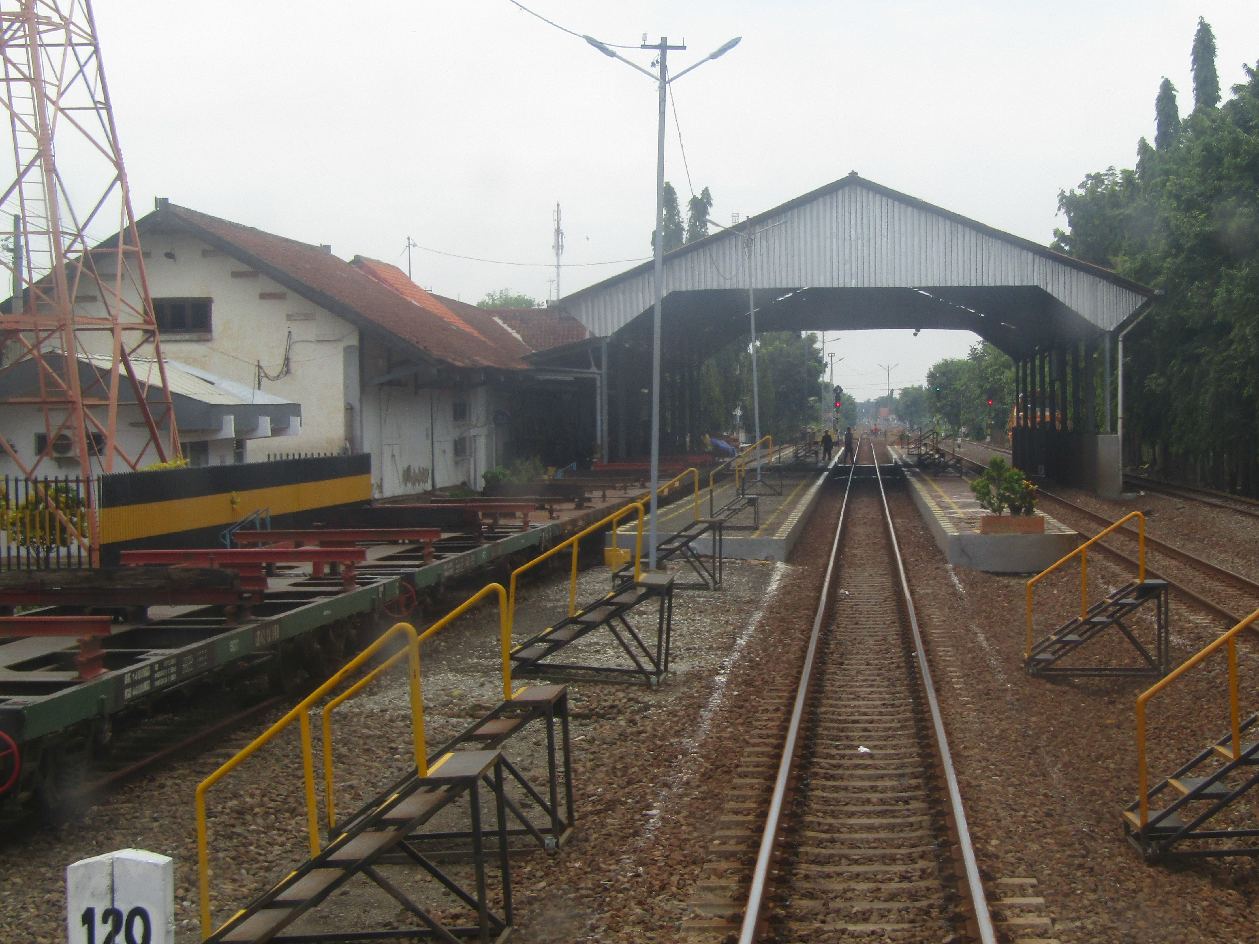 Emplasemen Stasiun Pemalang, 2019